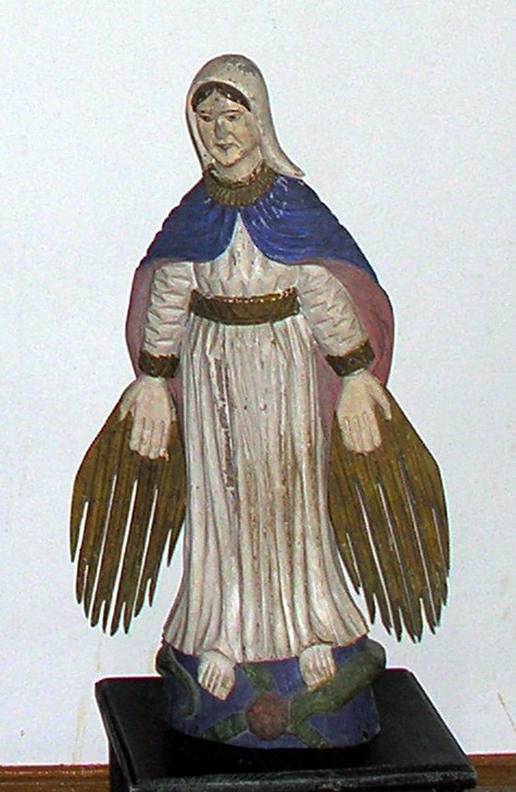 Marija Maloningoji Foto: Algirdas, 2005 m. lapkričio 3 d.